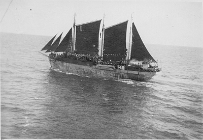 אוניית המעפילים כ"ט בנובמבר